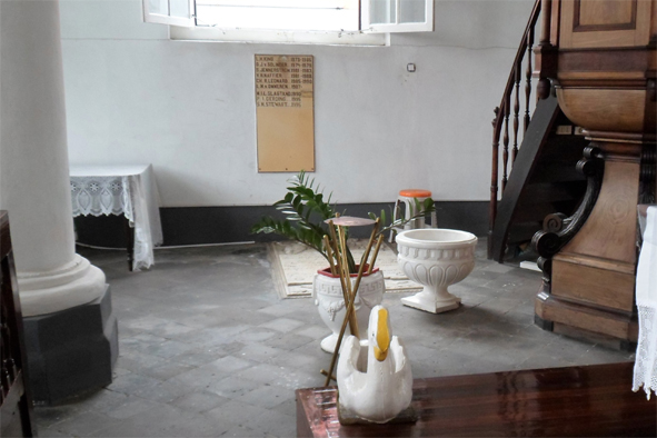 JGClemen Grab1